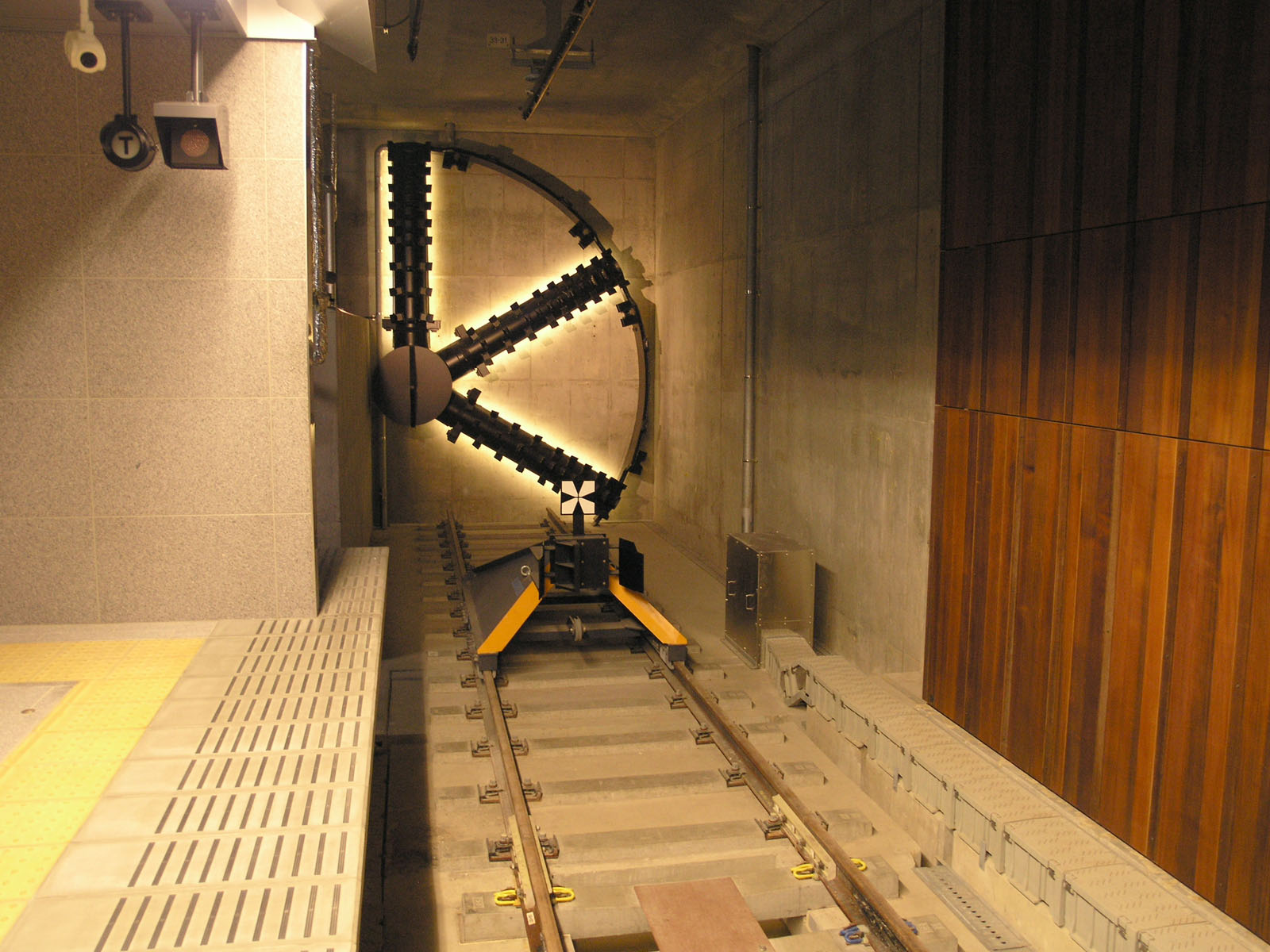 京阪中之島駅（大阪市北区） 2008年10月撮影。 機材：C8080WZ 撮影者：Kansai explorer